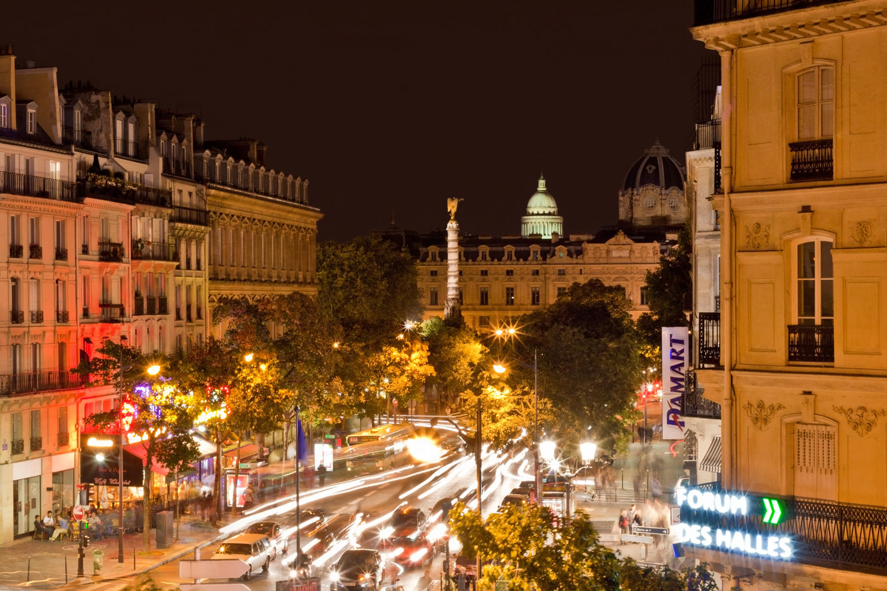 Place du Châtelet (Paris) et début de la rue Saint-Denis.